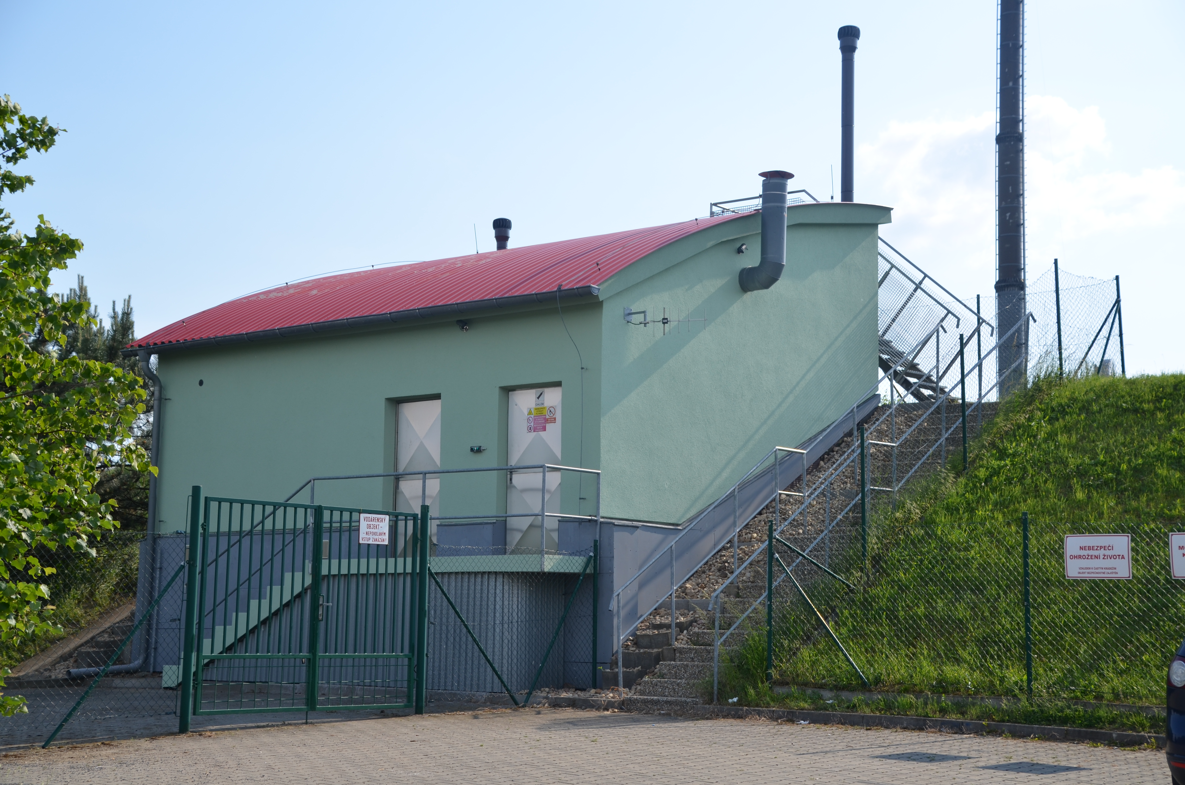 Rozhledna Holý kopec, vybudovaná na střeše místní vodárny.